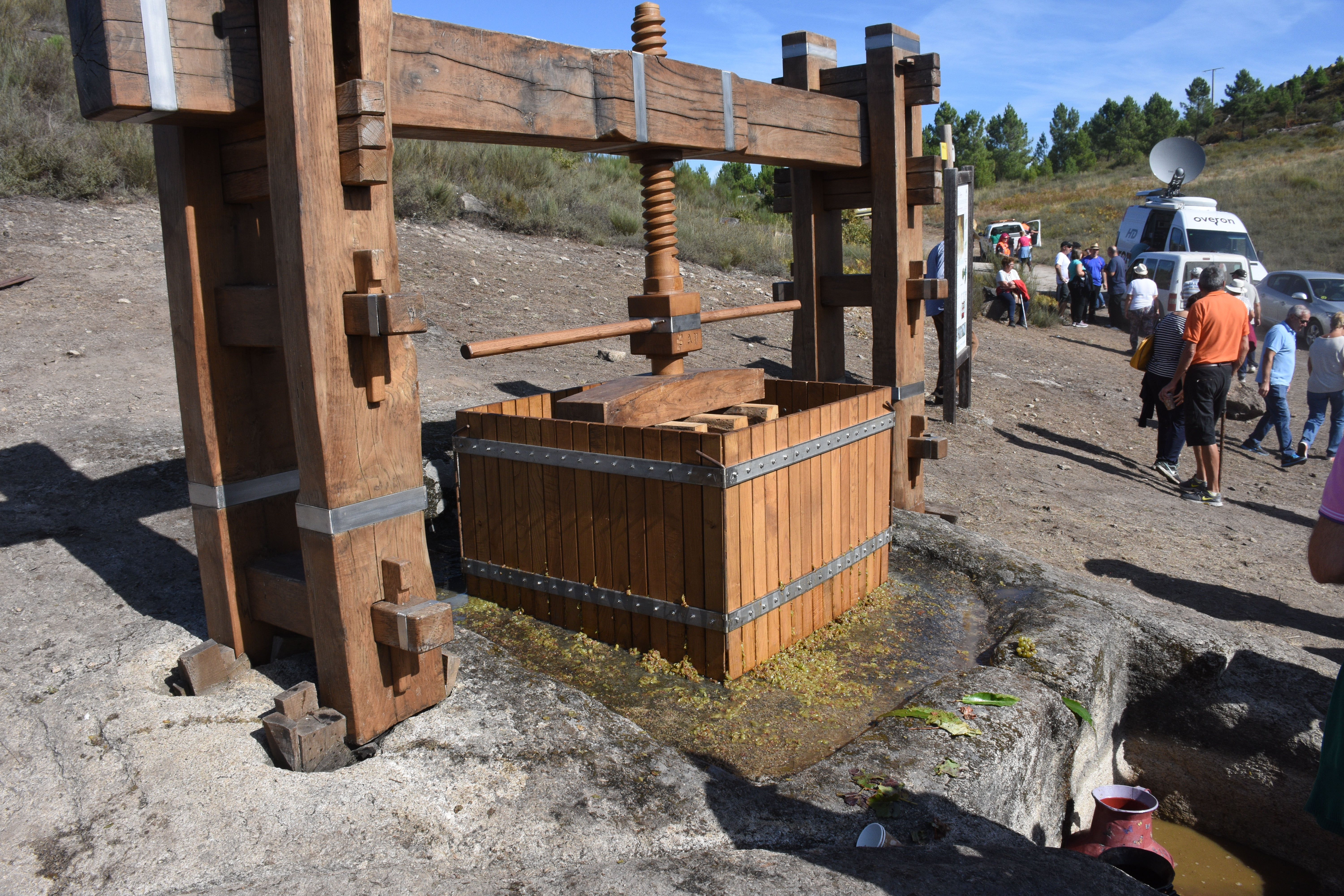 Recreación do prensado das uvas nun antigo lagar escavado en granito